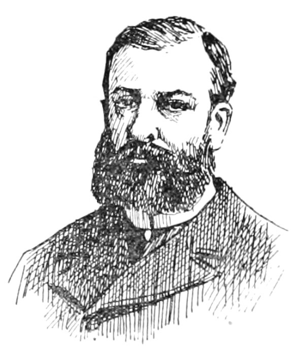 "La Nouvelle Chambre" : "Lévis-Mirepoix".